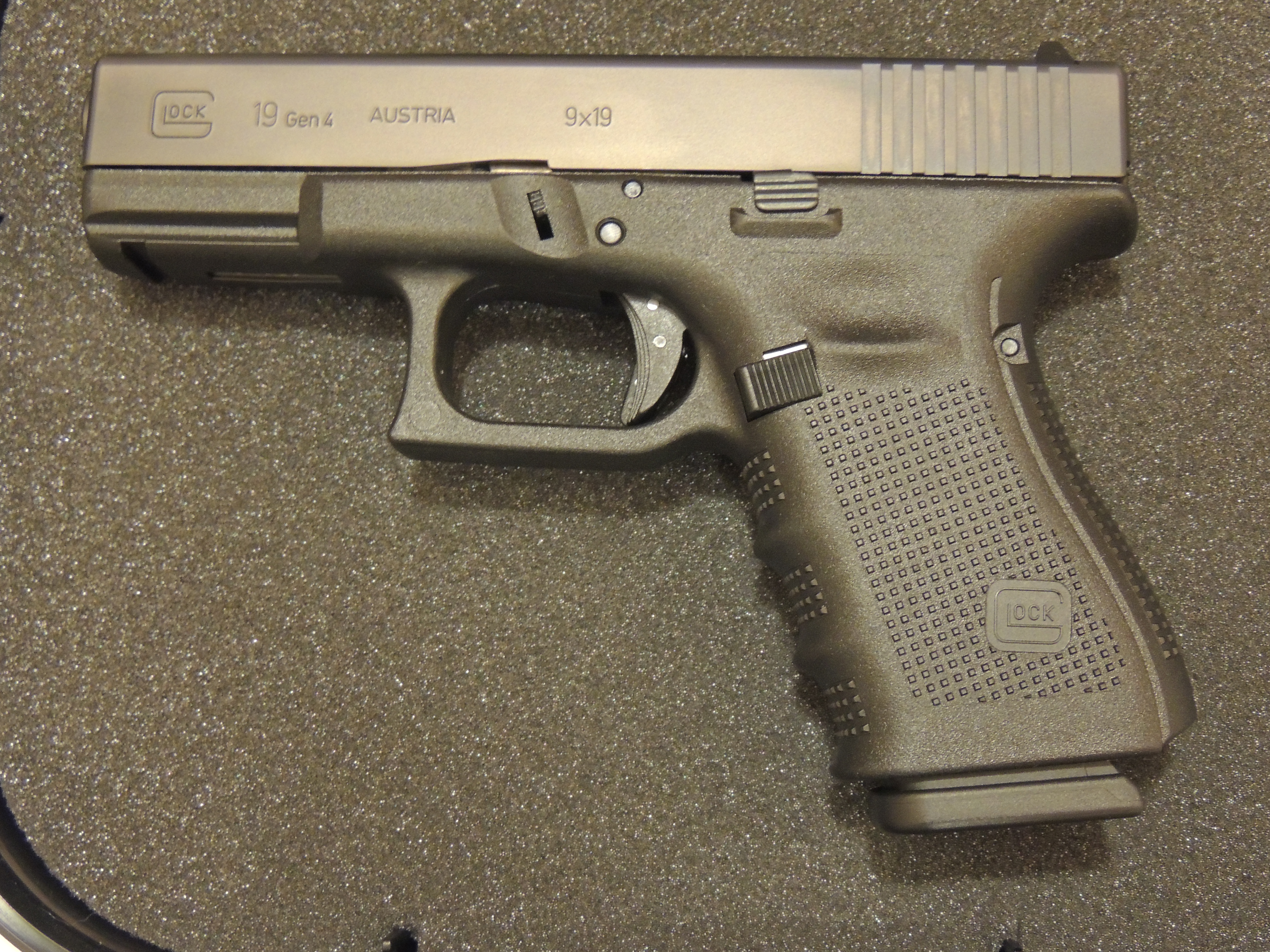 Glock 19 Gen4